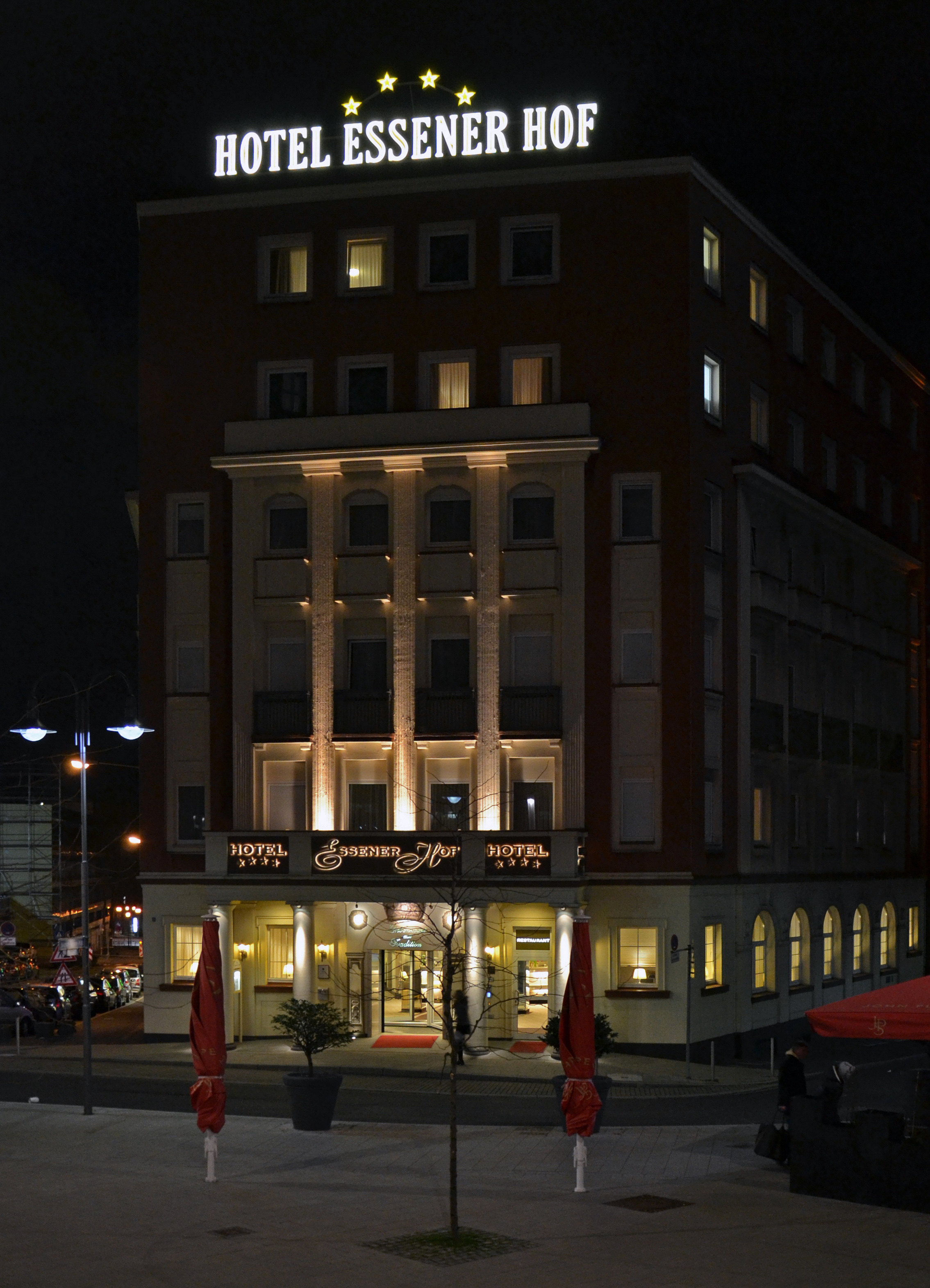 Hotel Essener Hof im Essener Stadtkern